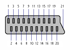 de nummering van een scart weergegeven